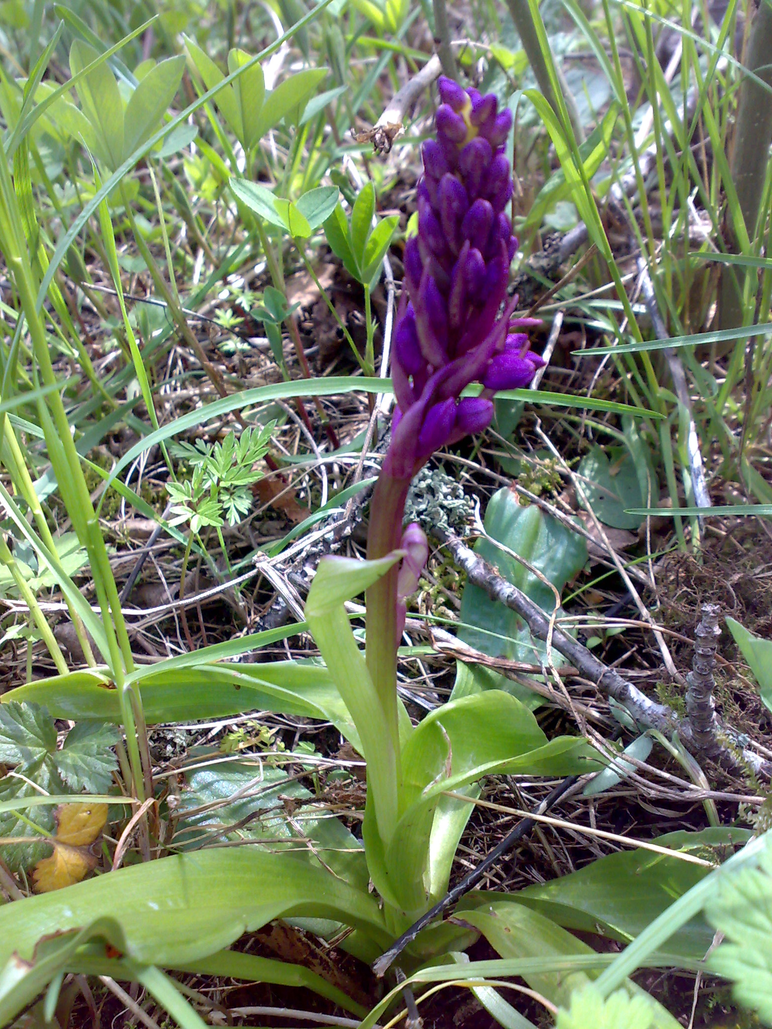 Vårmarihånd, Hurum, Norway